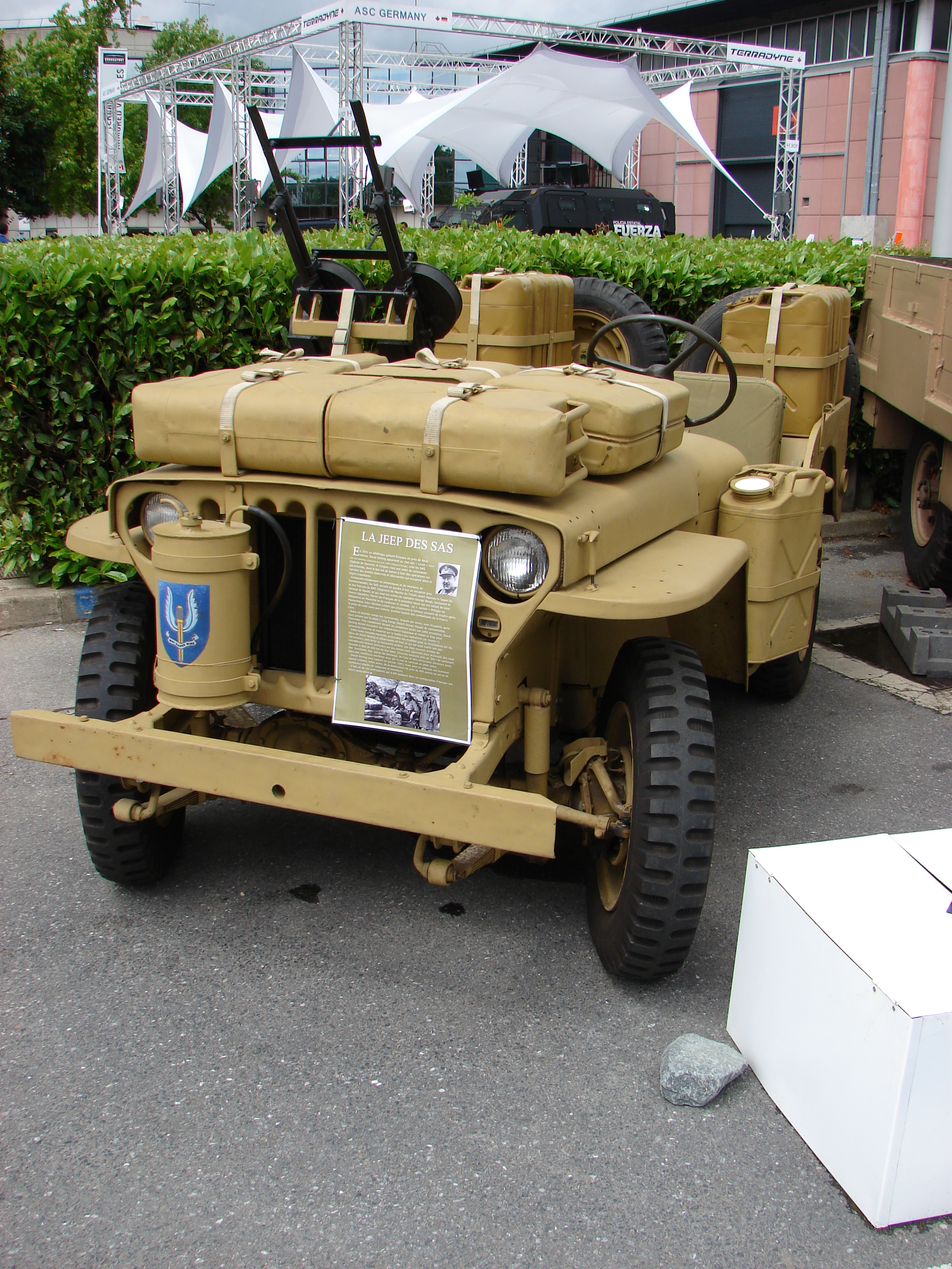 Véhicule militaire exposé à Eurosatory en 2012.